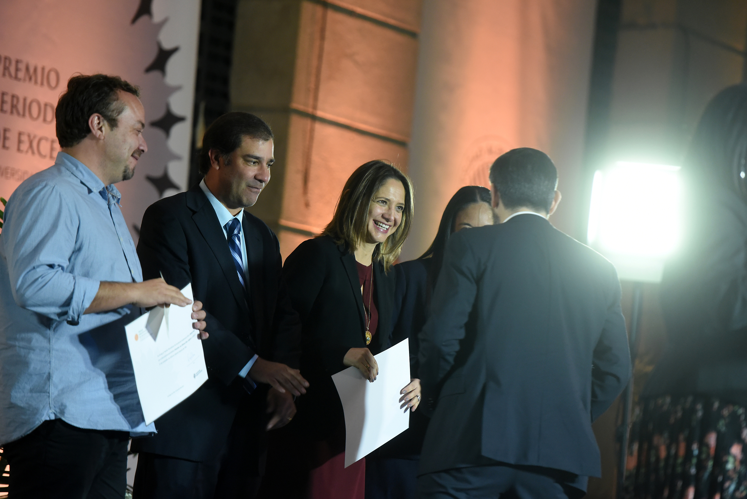 26 Abril 2017. Ministra Paula Narváez participa en premiación a la excelencia periodística organizado por la universidad Padre Hurtado.